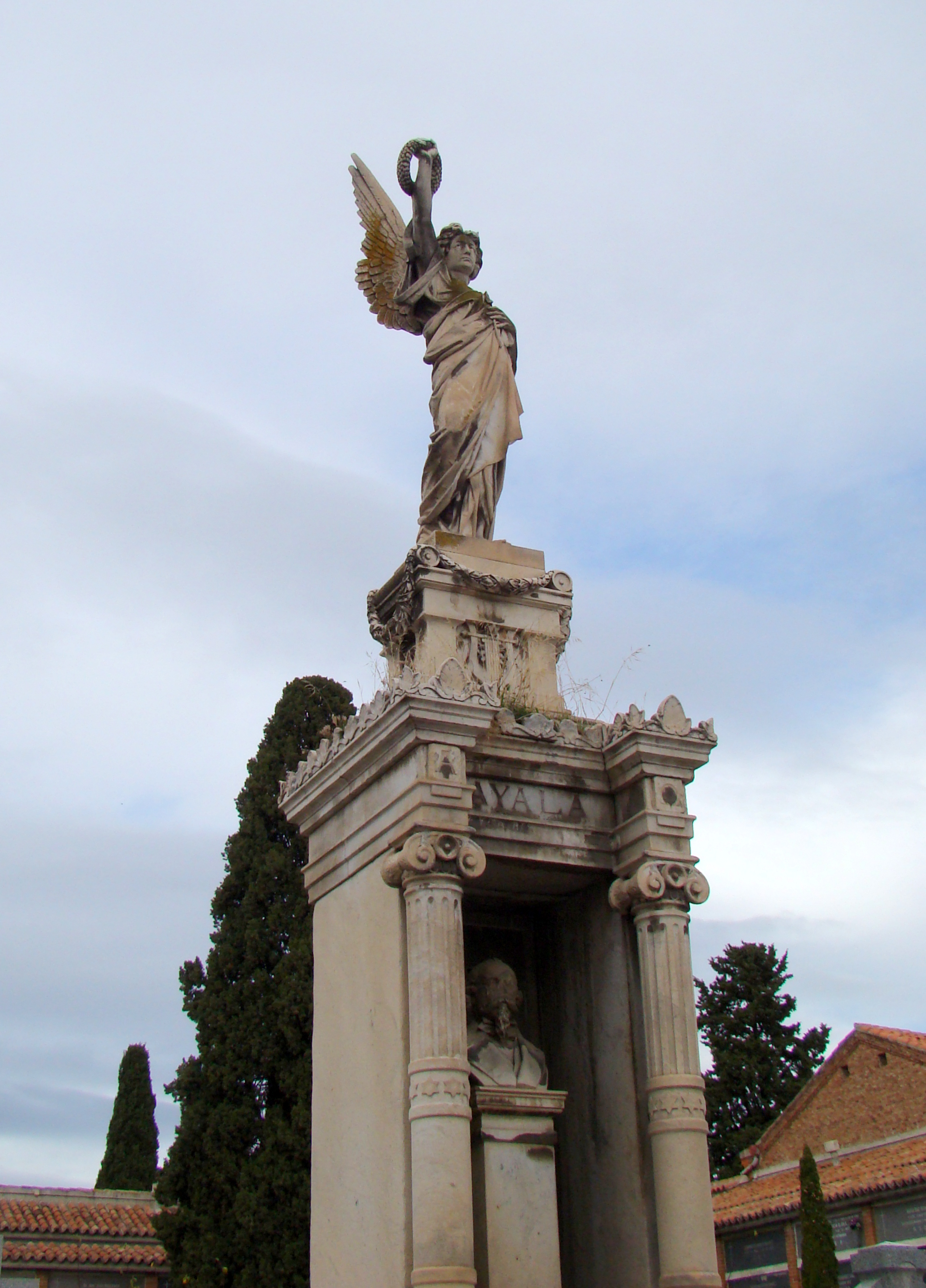 A quien le debe su nombre la calle Ayala de Madrid. Ver también .es/2015/03/dond... y .es/2015/03/dond... "el del político y dramaturgo Adelardo López de Ayala, de 1882, obra muy fina de Miguel Aguado de la Sierra, con edículo neogriego de orden jónico rematado por un ángel de mármol de los hermanos Vallmitjana" (EL CEMENTERIO DE LA SACRAMENTAL DE SAN JUSTO: HISTORIA Y ARQUITECTURA Por CARLOS SAGUAR QUER) DSC00356